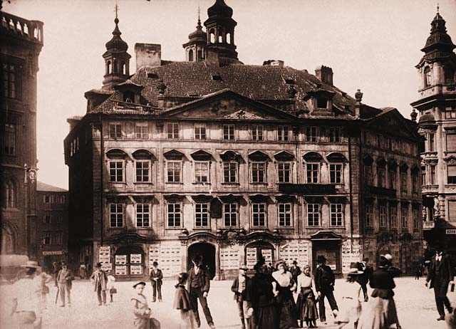 Krennův dům čp. 936 uzavíral plochu Staroměstského náměstí před kostelem sv. Mikuláše. Byl zbořen v rámci asanace v r. 1902